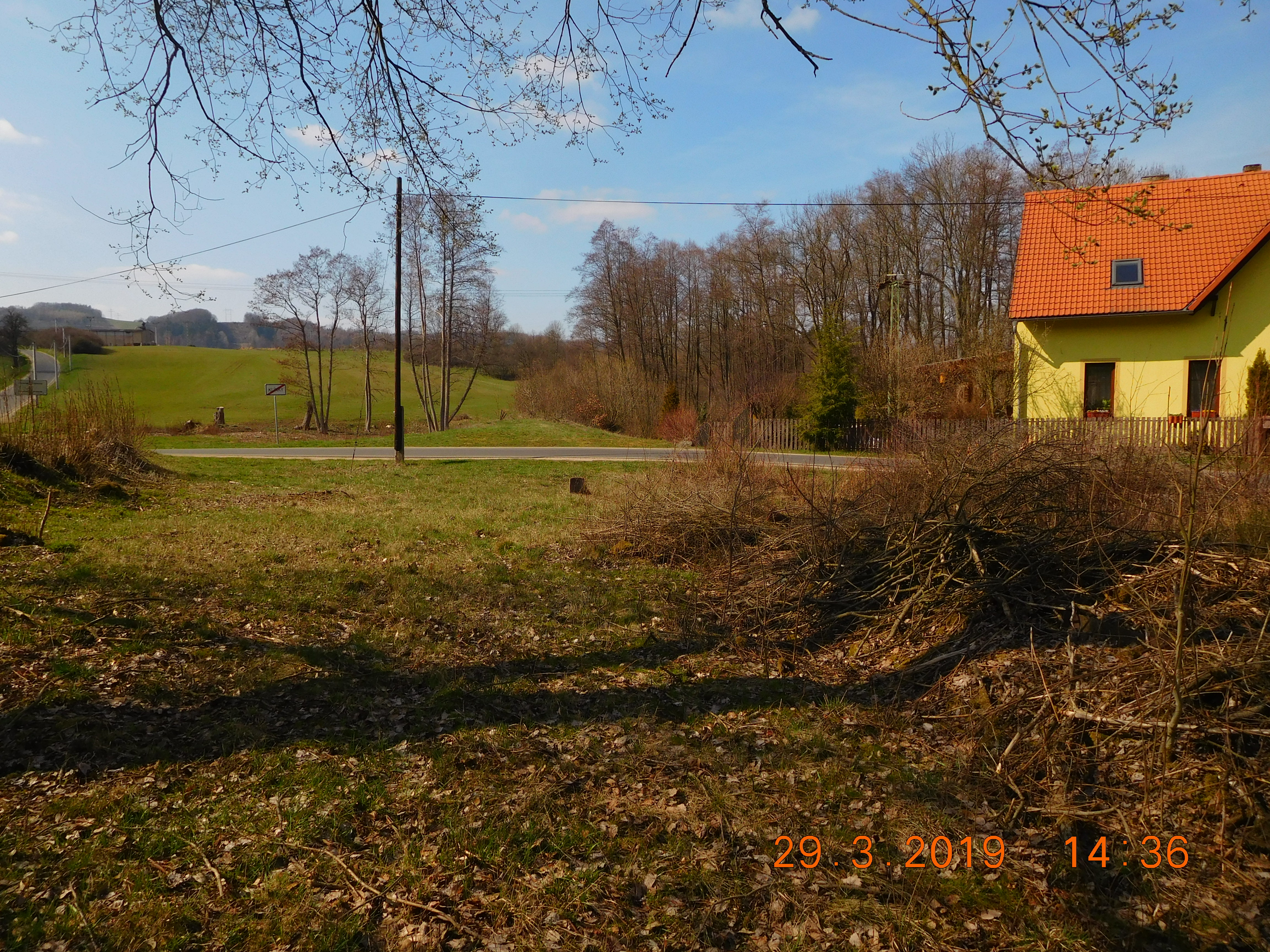 V místech za silnicí (bývalý železniční přejezd) na začátku osady Klínky, stávala železniční zastávka.